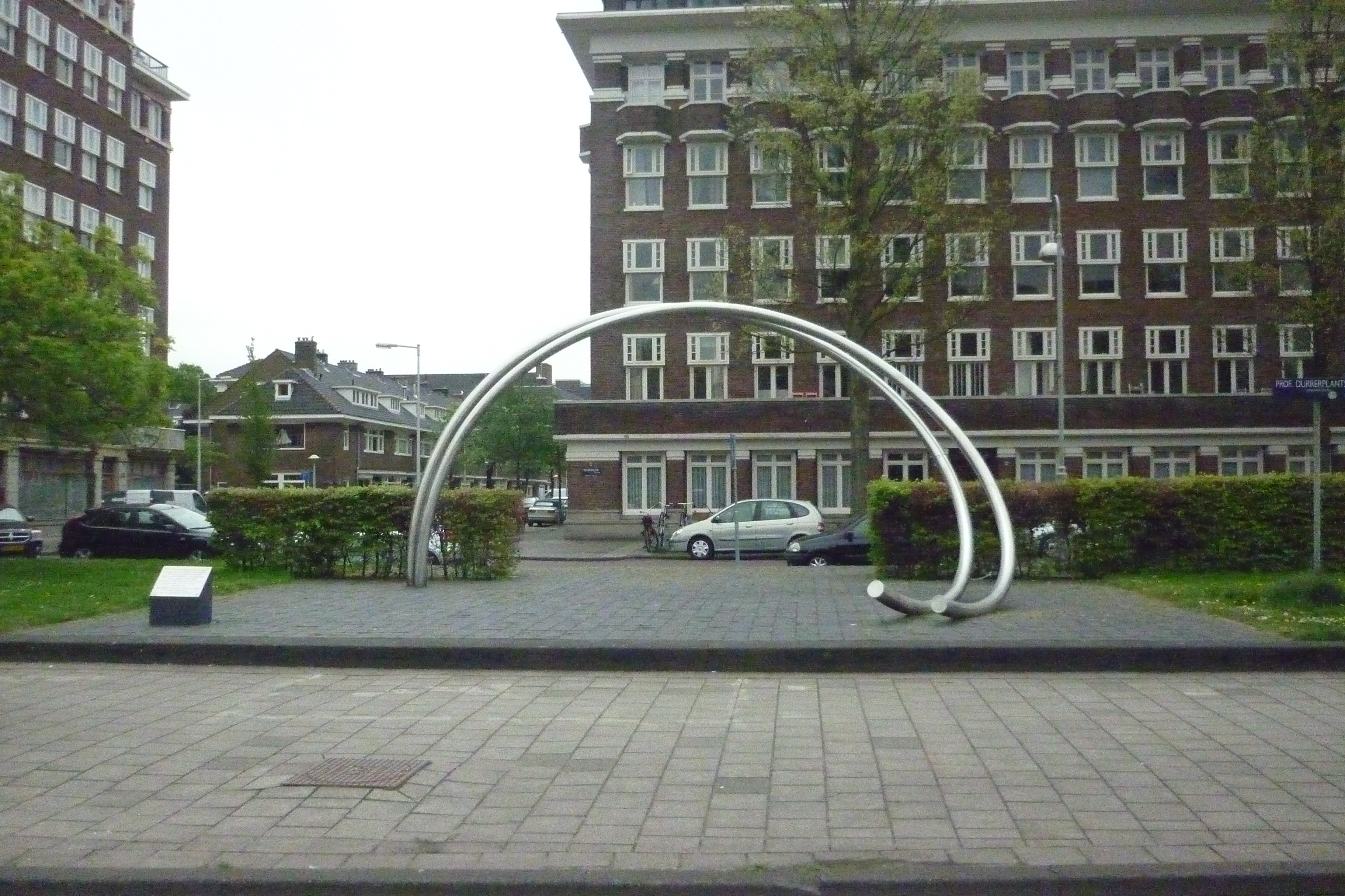 Durrer monument Amsterdam